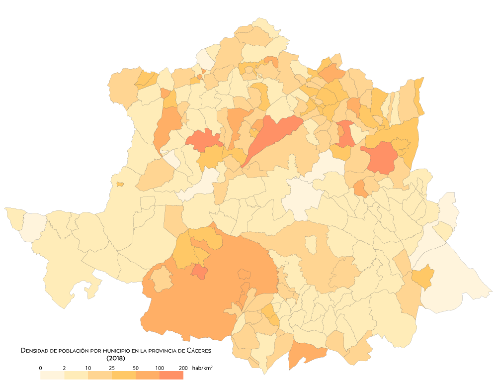 Densidad de población por municipio en la provincia de Cáceres en 2018.